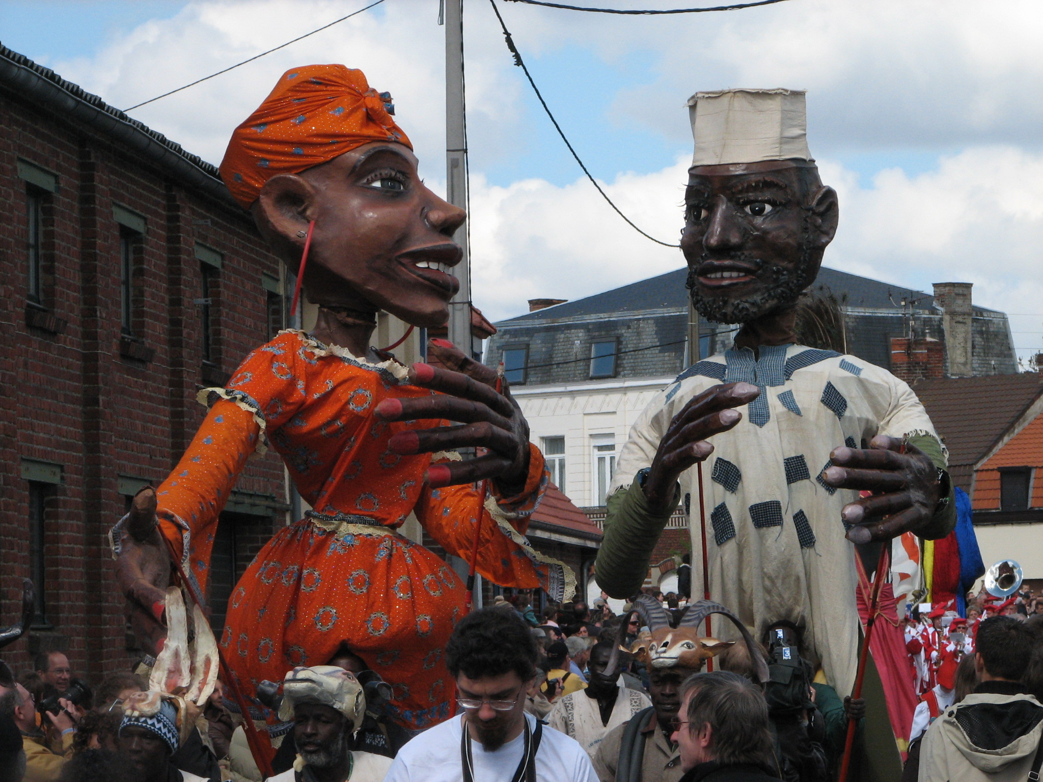 Poko et Soumalia, géants de Boromo, Mali. Photo personnelle prise à Steenvoorde le 30 avril 2006. Libre de droits.